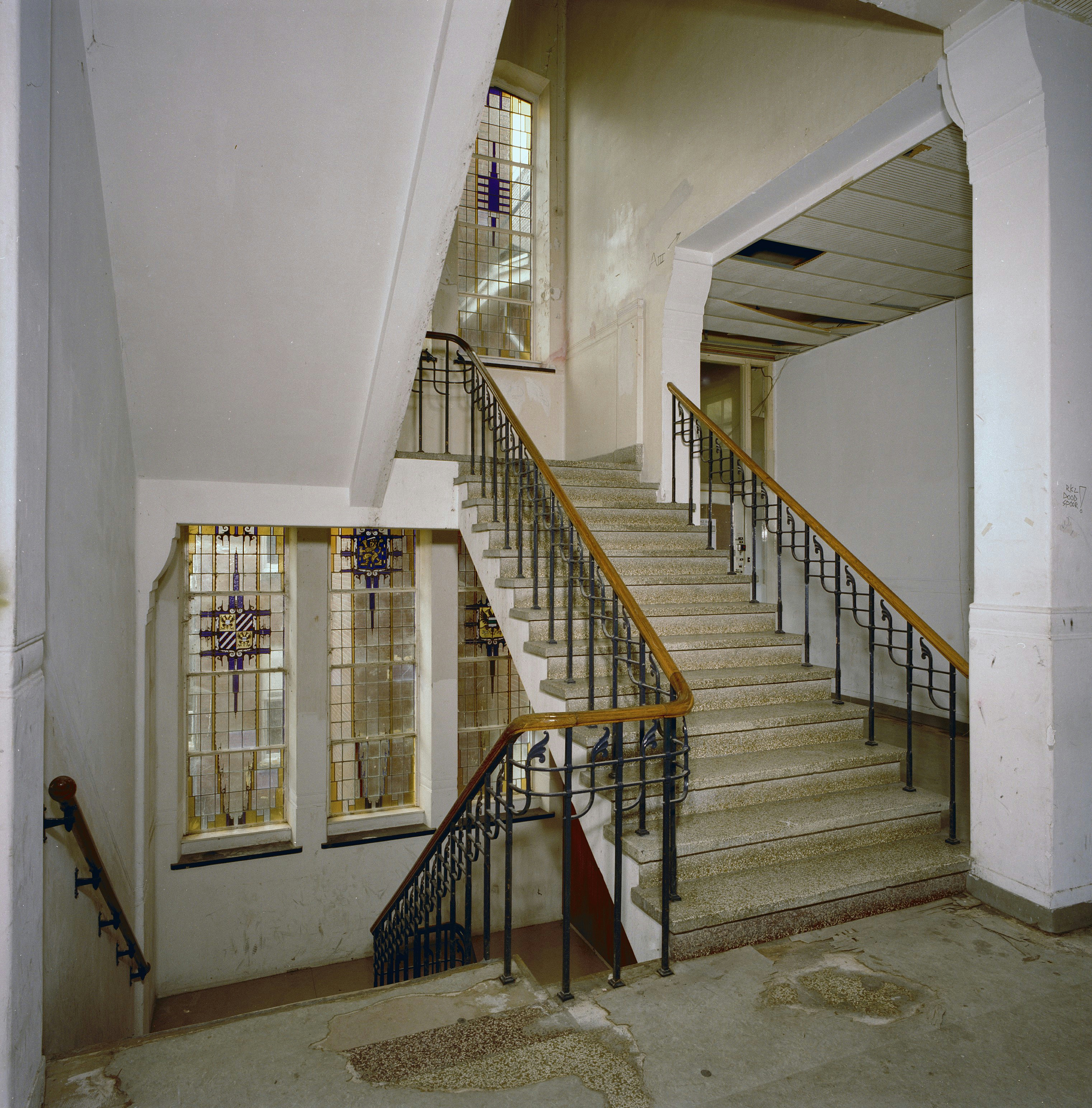 Oude RKZ, vleugel A, trappenhuis, 1993